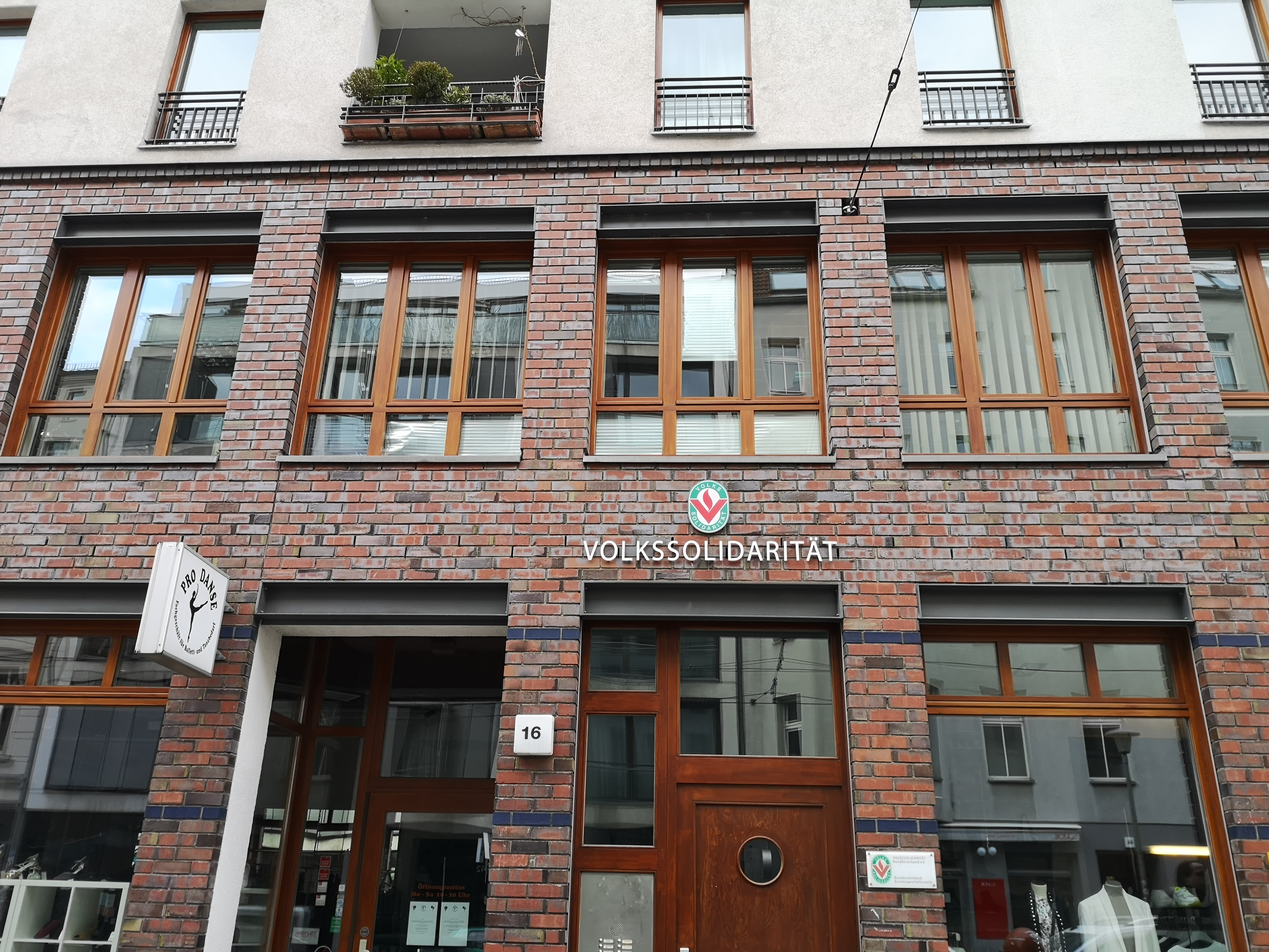 Geschäftsstelle in Berlin Mitte